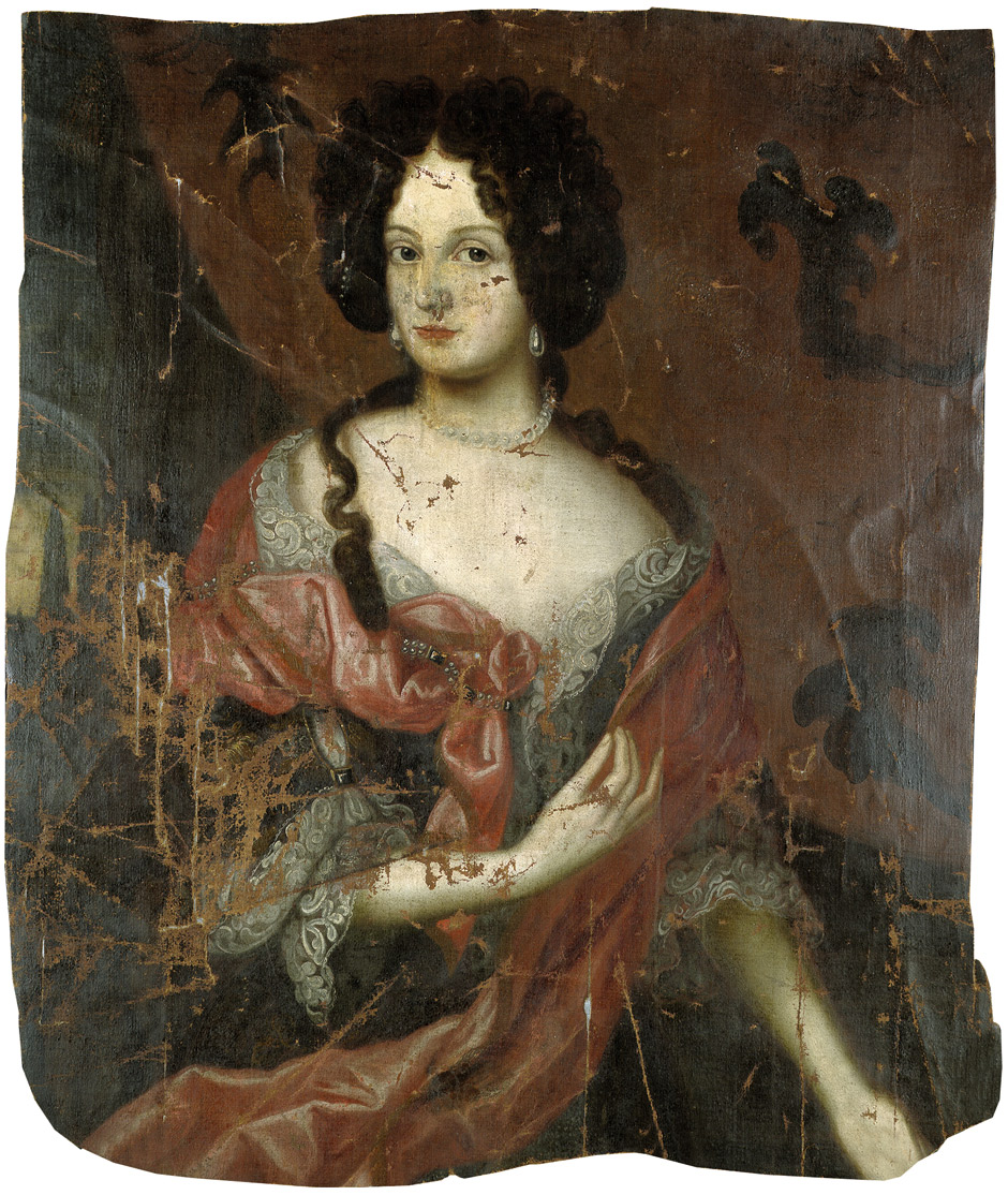 Bildnis Anna Hedwig Sophie von Steinberg (1665-1721). Öl auf Leinwand. 96 x 80 cm.